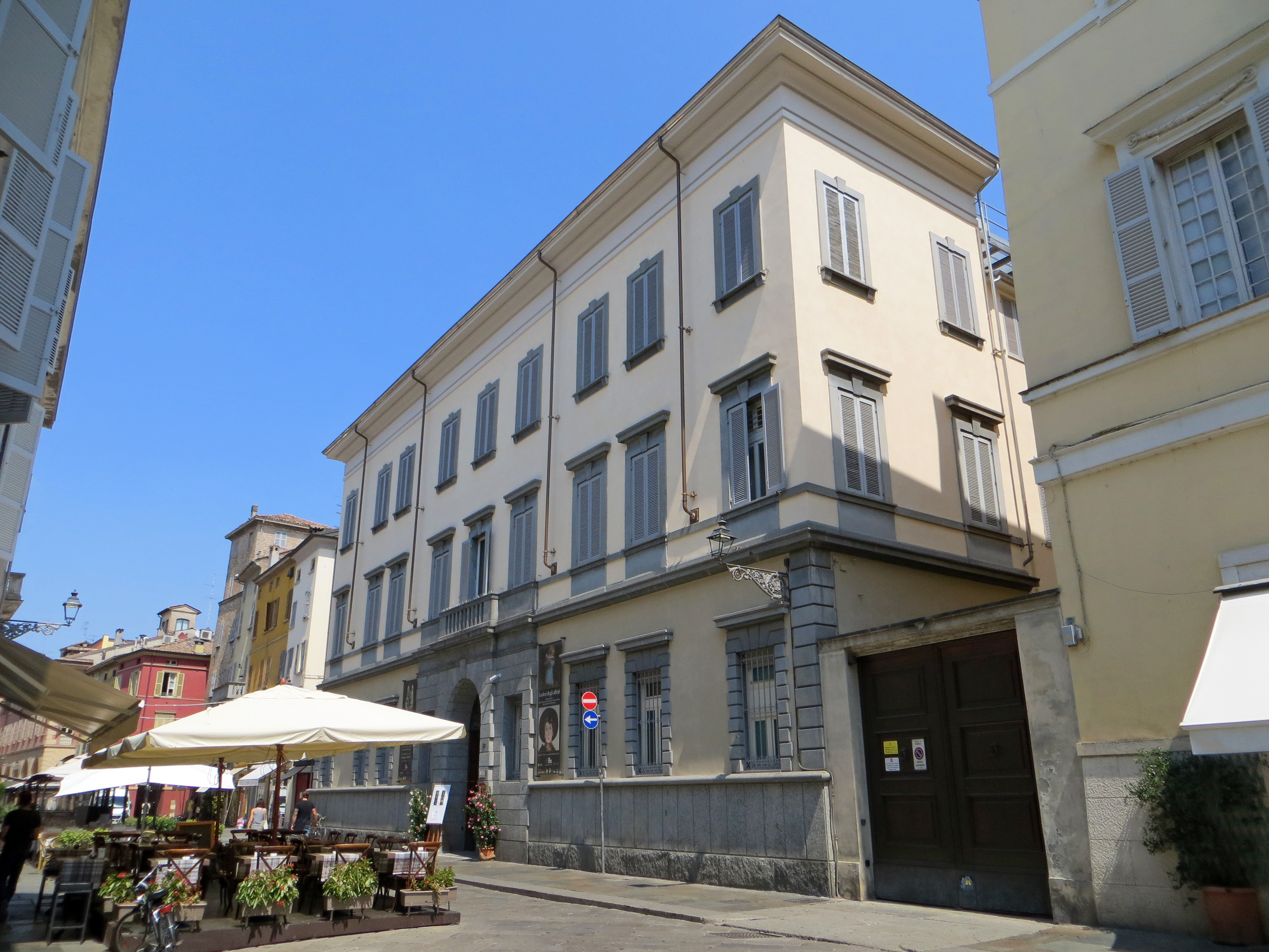 Palazzo della Fondazione Monteparma (Parma) - facciata